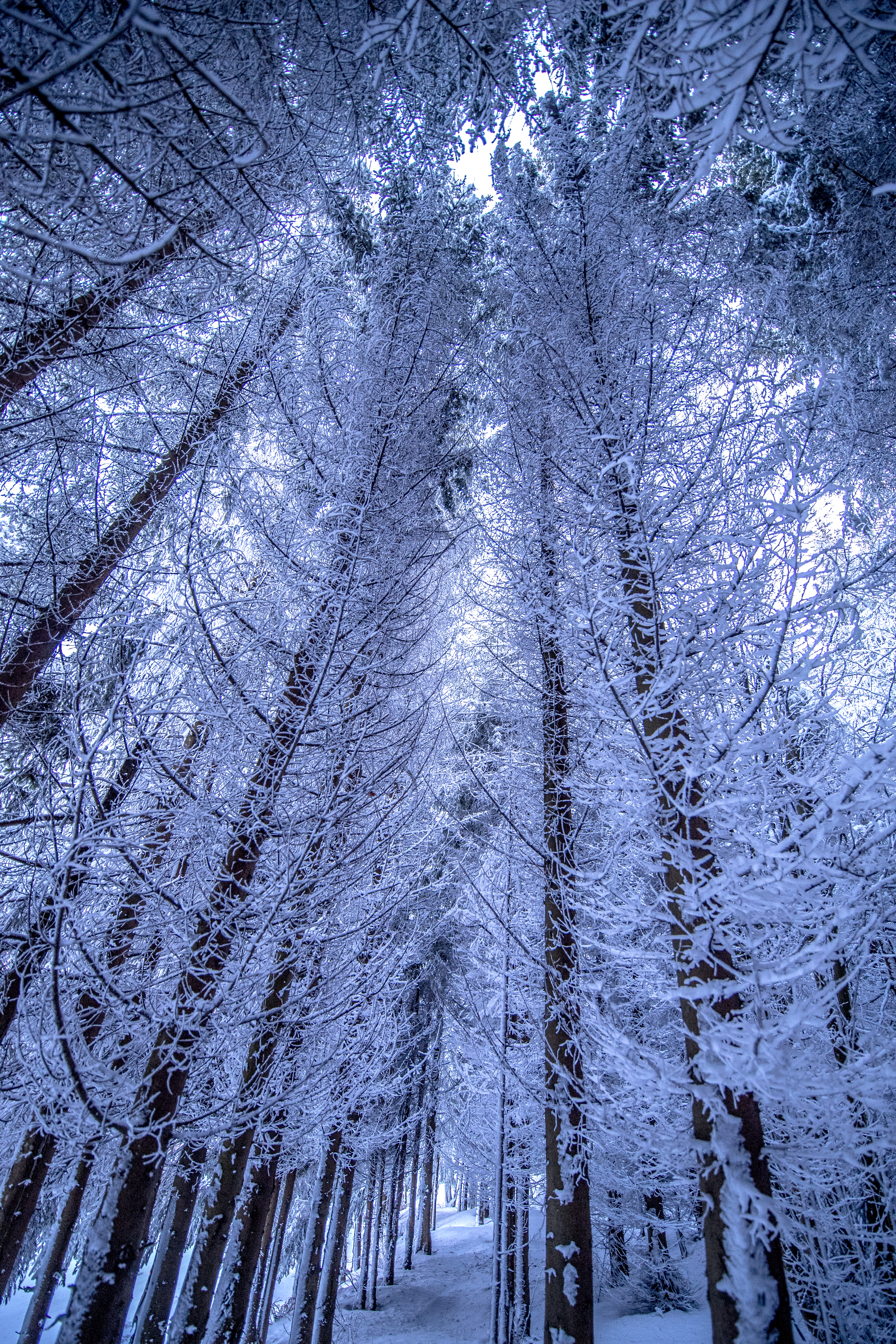 Parku Kombëtar Sharri, Prizren Suharekë Kaçanik Shtërpcë, Dragash